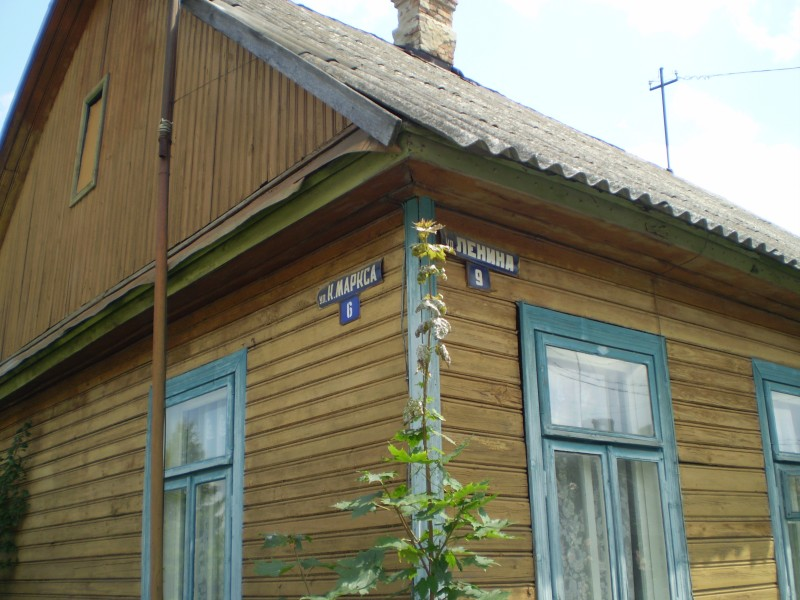 Дом з падвойным адрасам